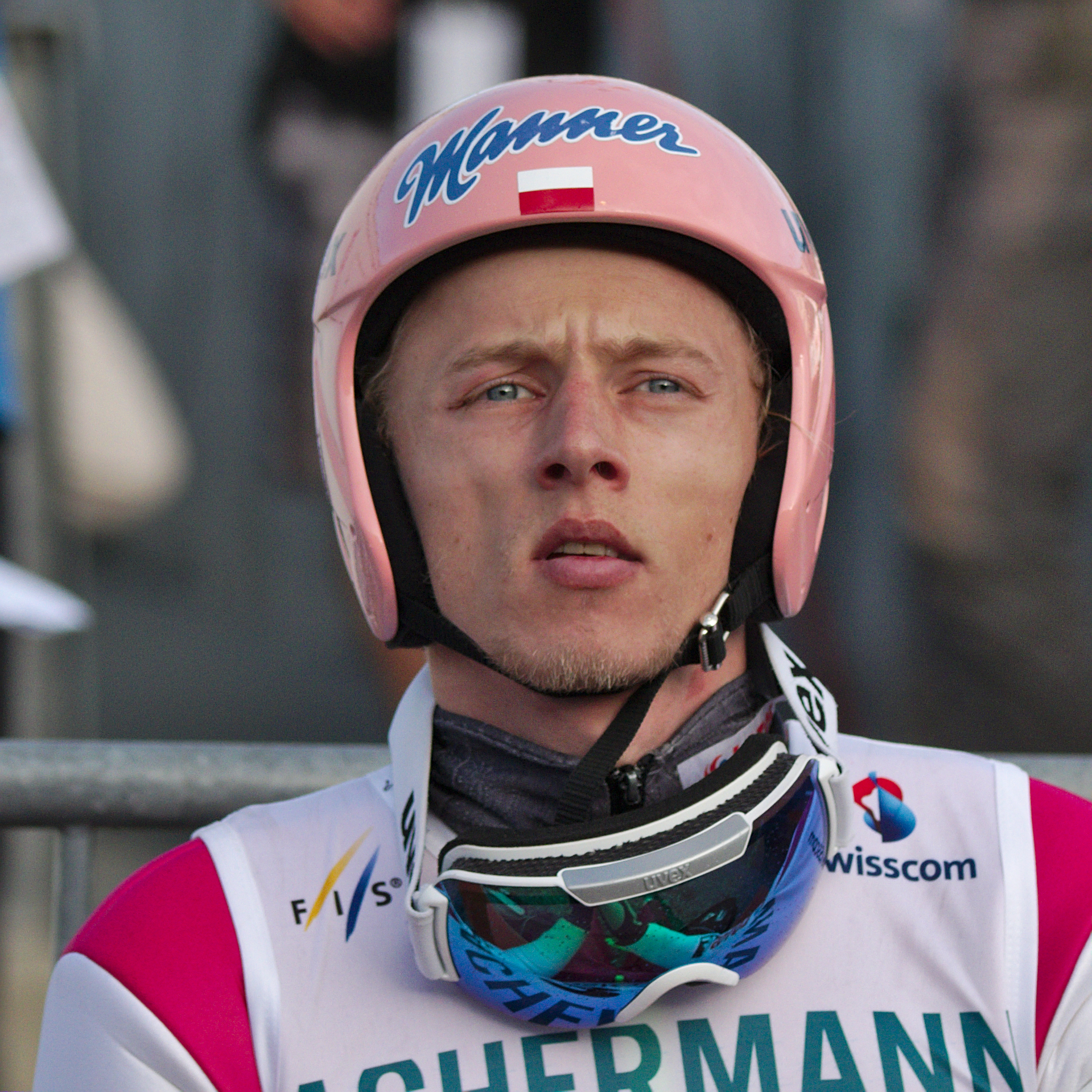 FIS Sommer Grand Prix 2014 - 20140809 - Dawid Kubacki